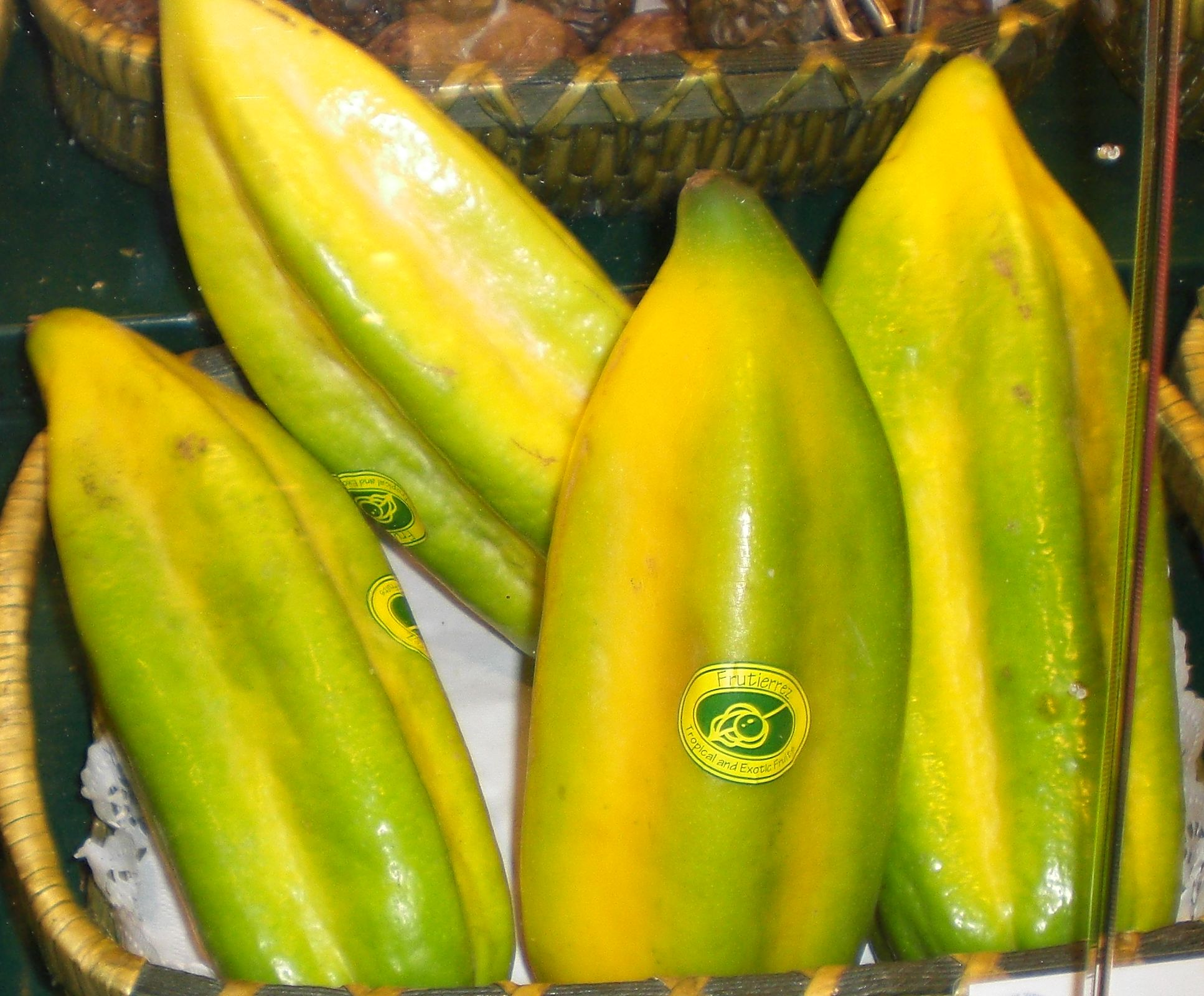 Frucht